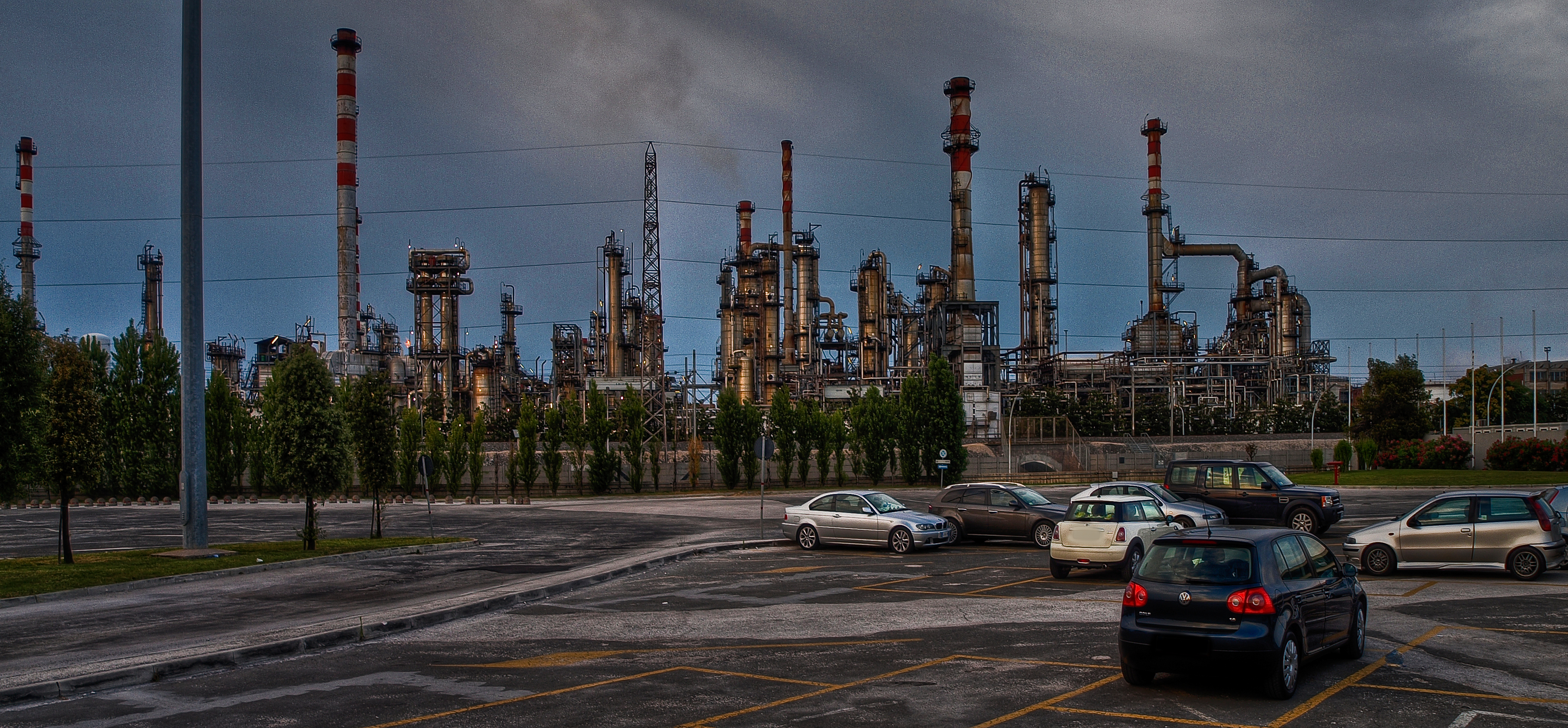 Raffineria petrolifera Api a Falconara Marittima.